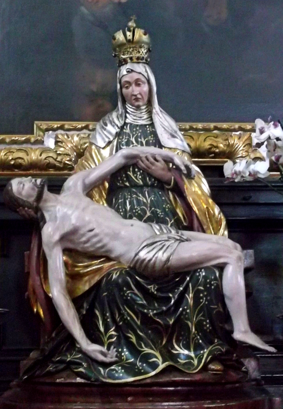 Chełmsko Śląskie - kościół parafialny p.w. Świętej Rodziny, 1680-1690 (zabytek nr rejestr. A/2048/1008 z 8.01.1964)